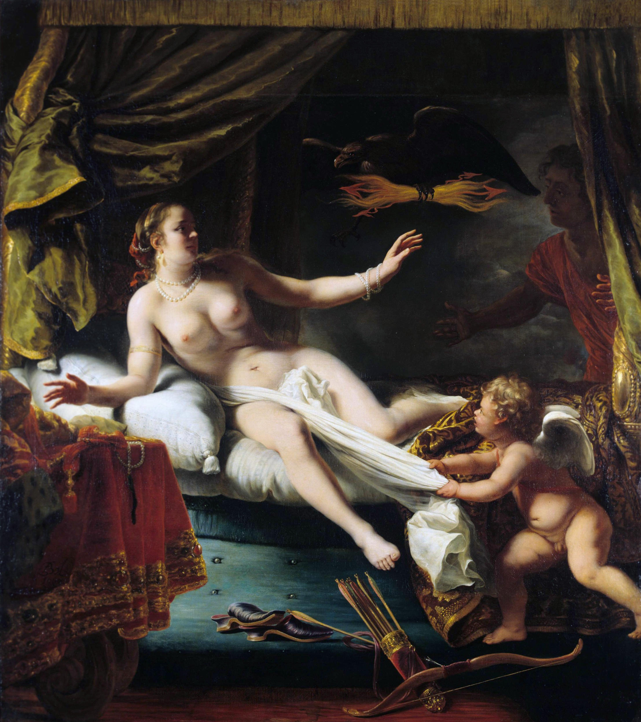 Aegina wacht op de komst van Zeus